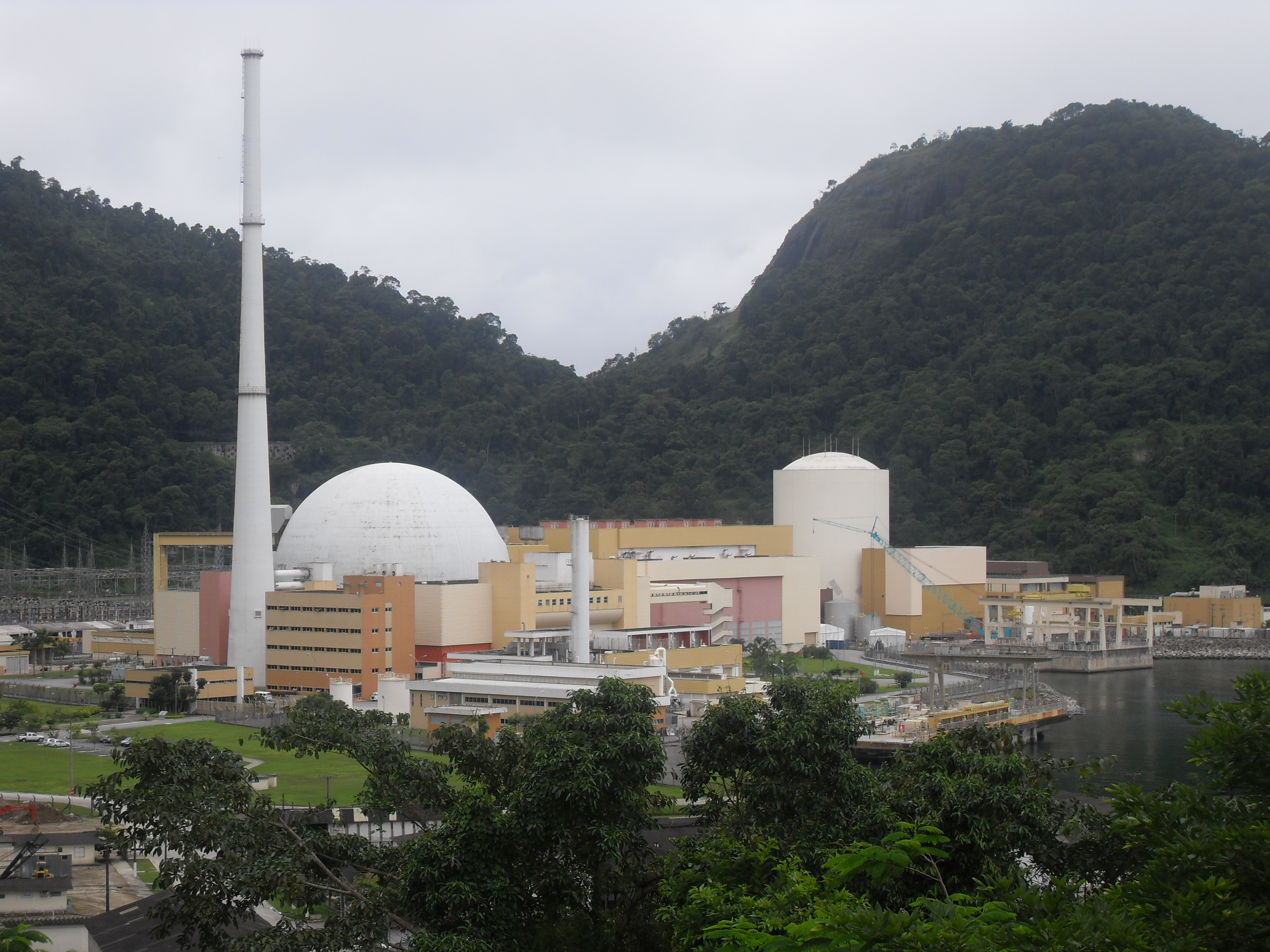 Vista da Central Nuclear Almirante Álvaro Alberto